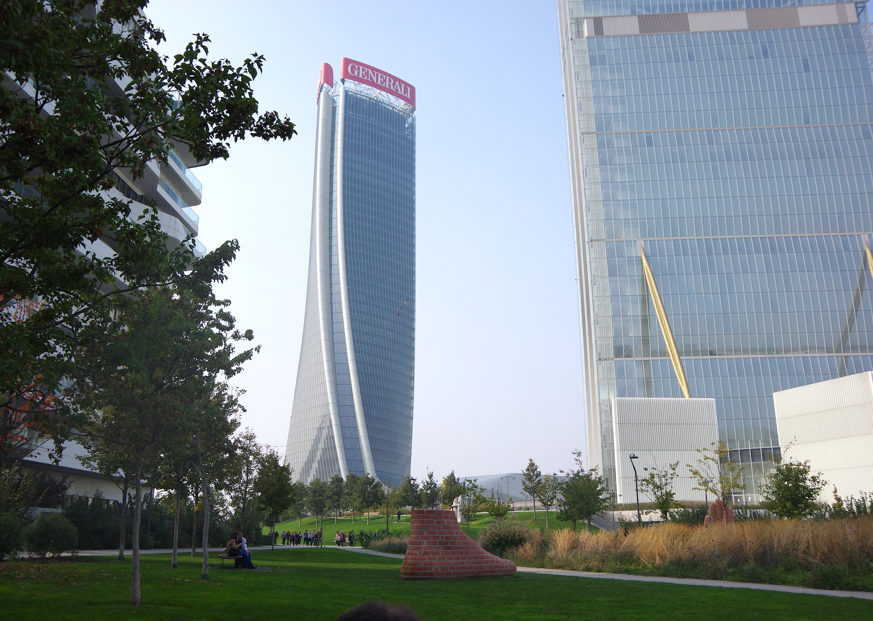 city life Milano